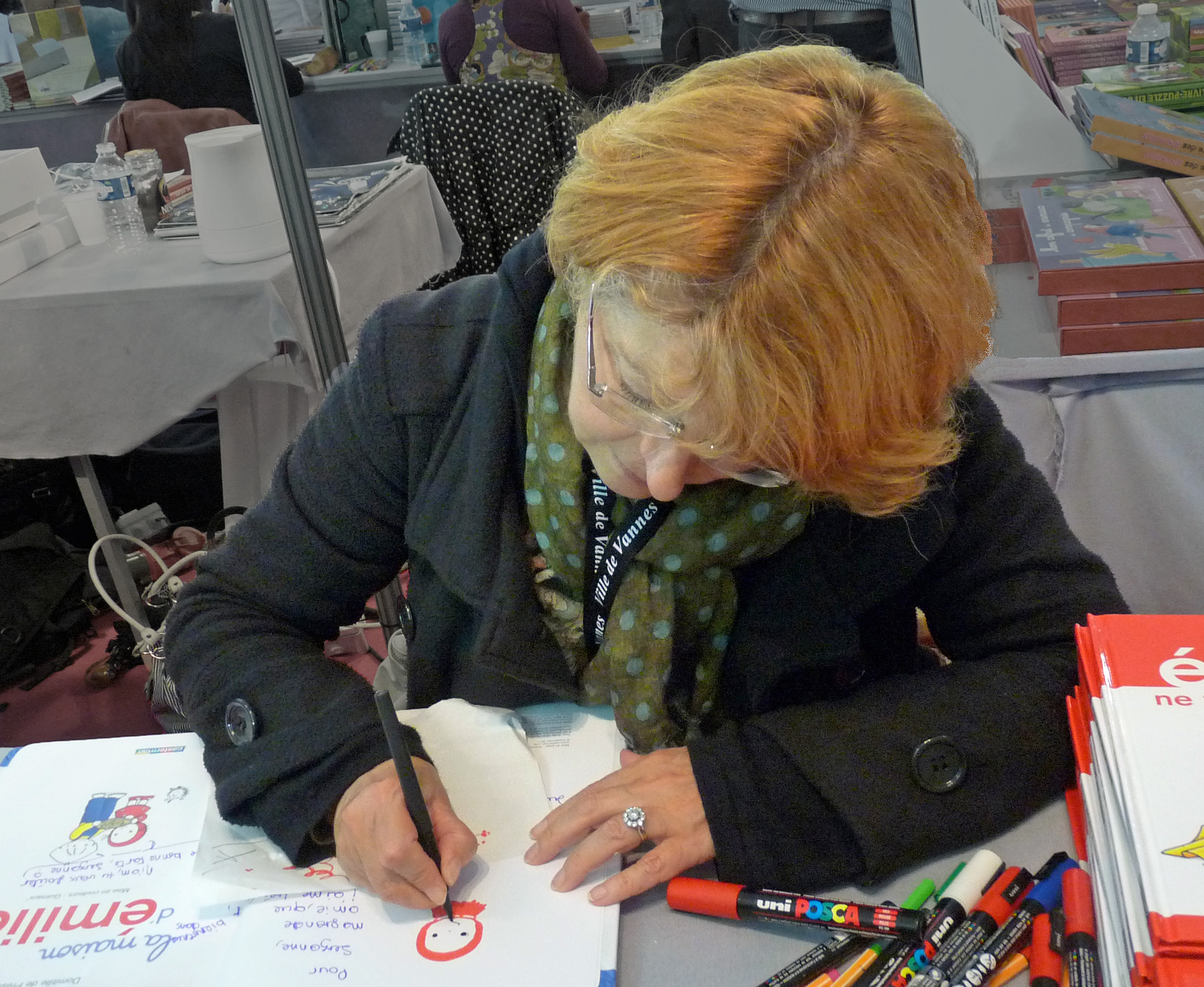 Domitille de Pressensé au Salon du livre en Bretagne (Vannes, Morbihan)